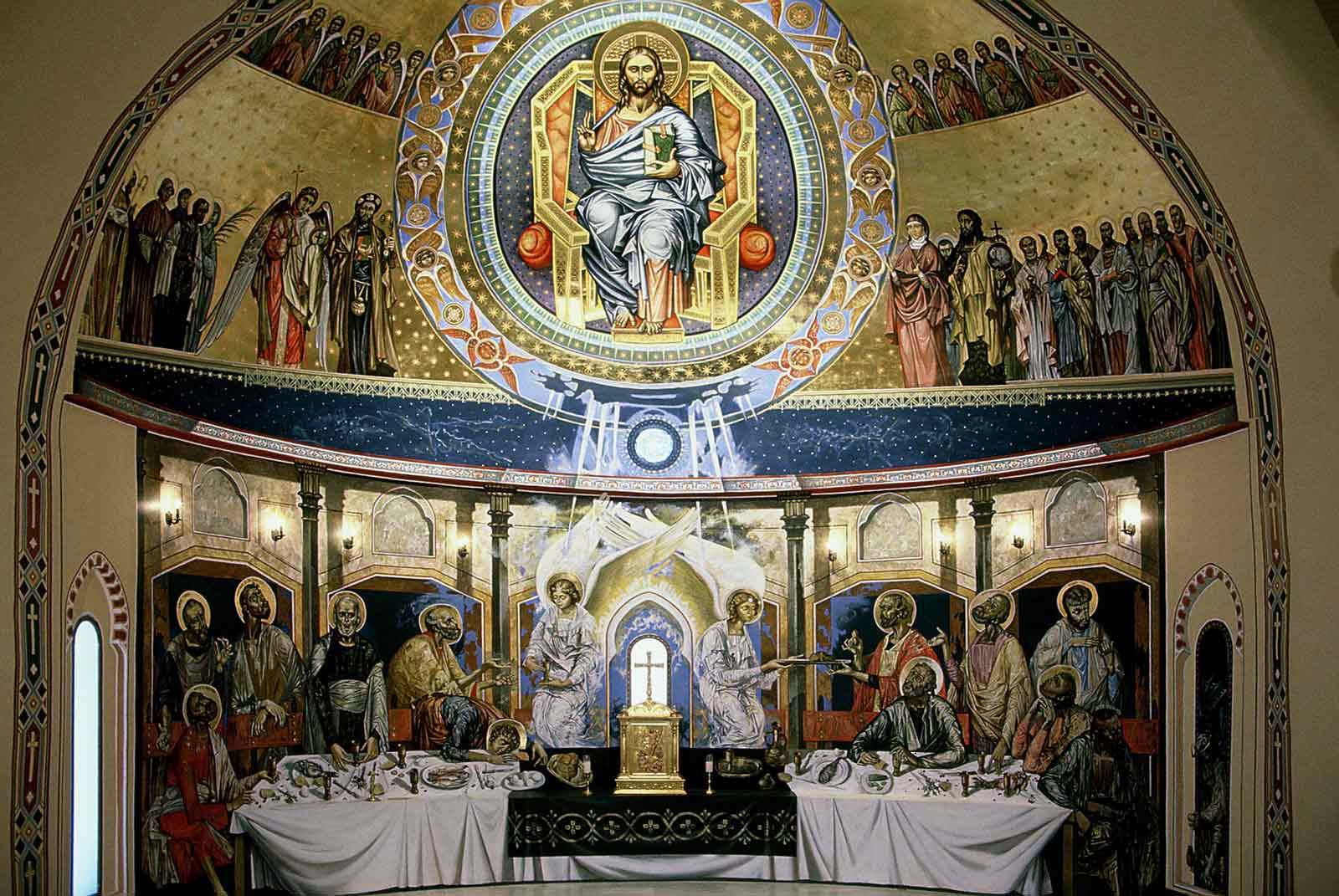 Fresco del presbiterio